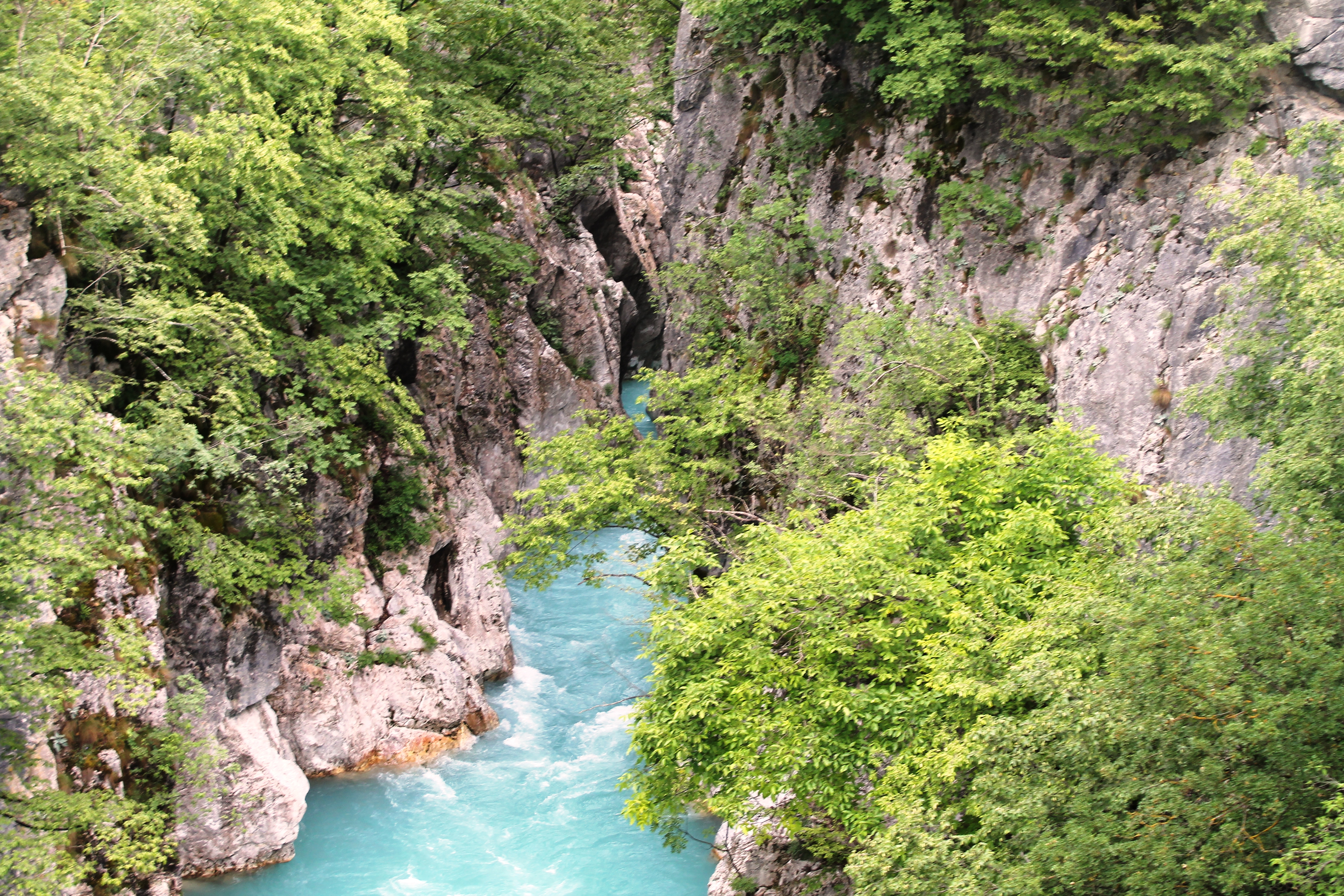 Kanjoni i Lumit të Valbonës, Shqipëri